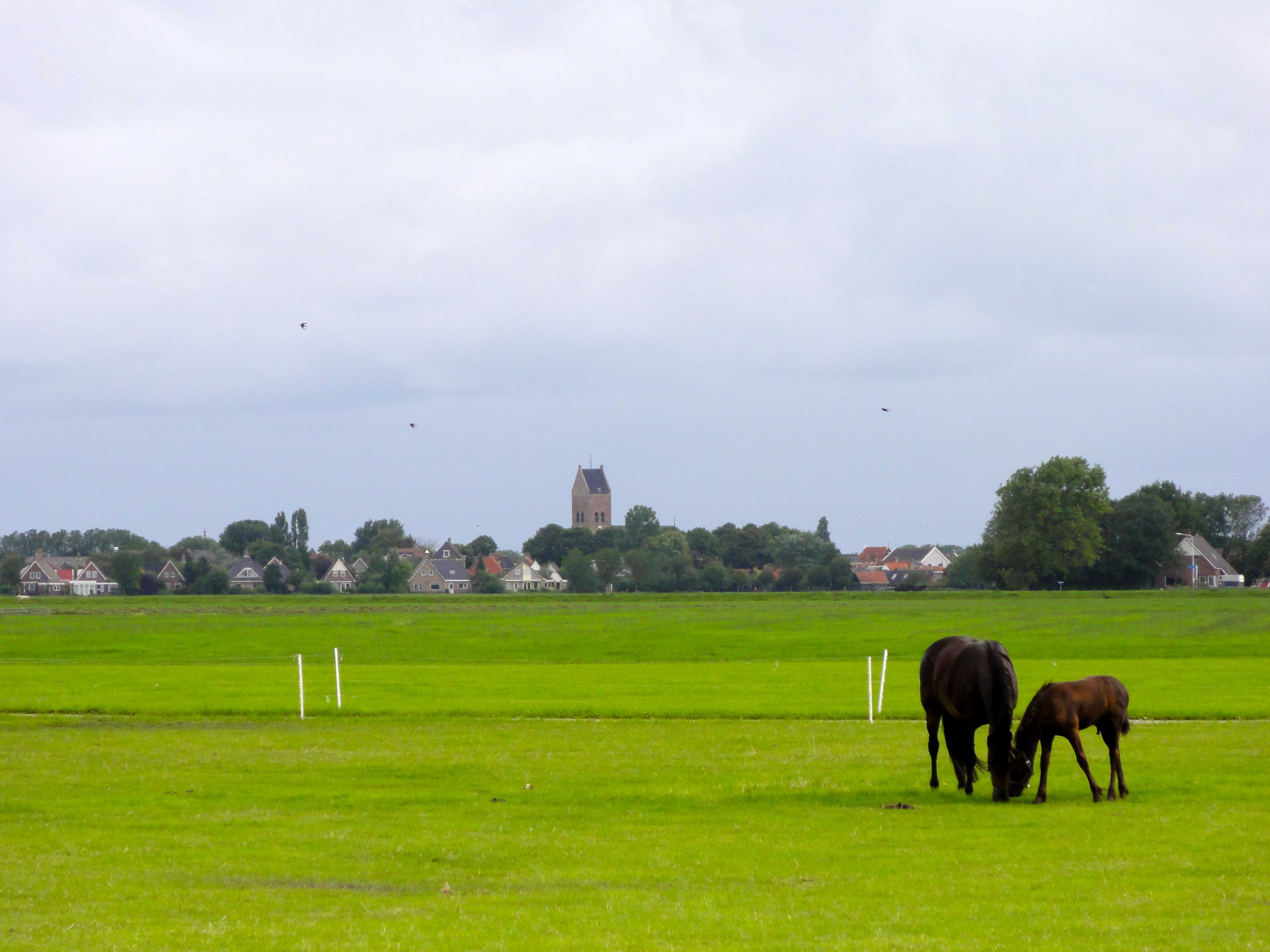 Zicht op Pingjum met de Sint-Victorkerk